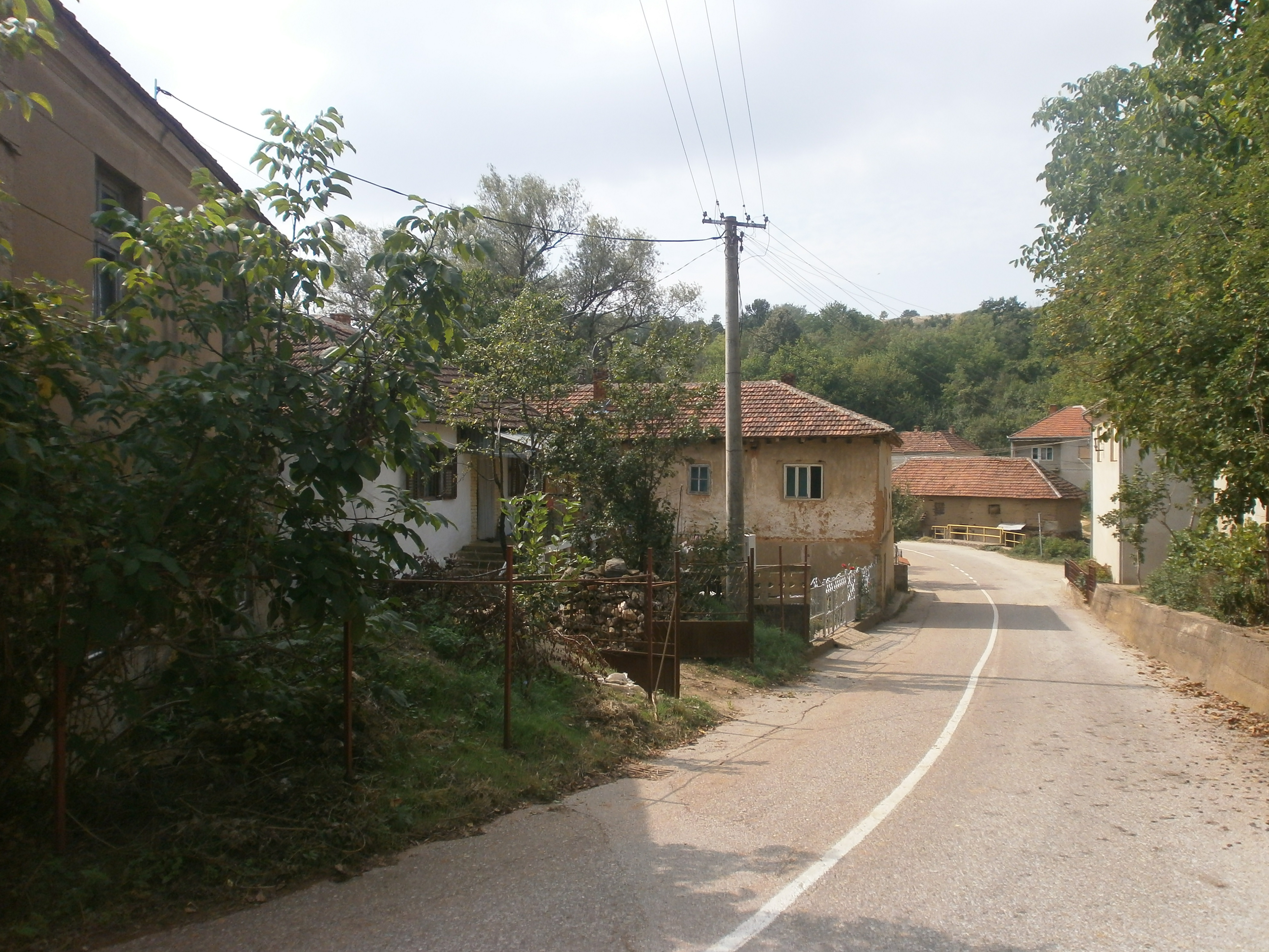 Srpski (latinica): Stupnica, Leskovac